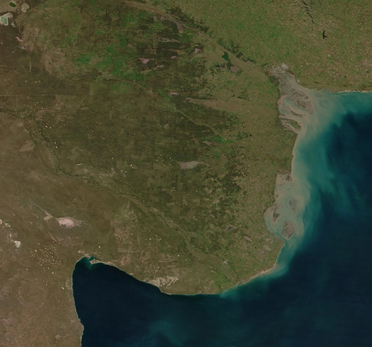 Imagen satelital de la costa atlántica argentina